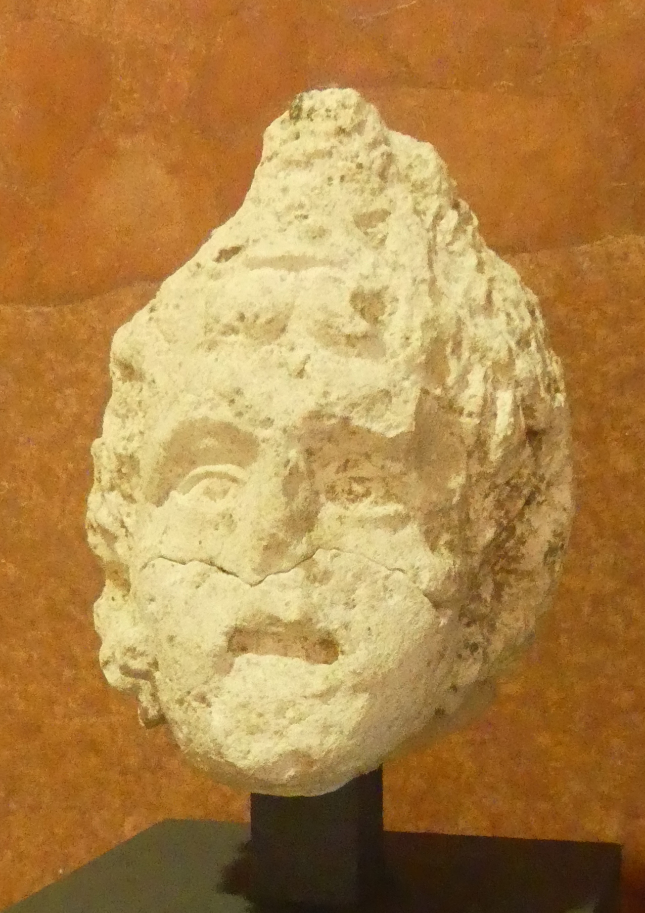 Cette tête est celle du dieu Attis, l'aimé de Cybèle, avec son attribut, le bonnet phrygien. Cette représentation en contexte funéraire symbolise l'affliction devant la mort et l'attente de la résurrection.